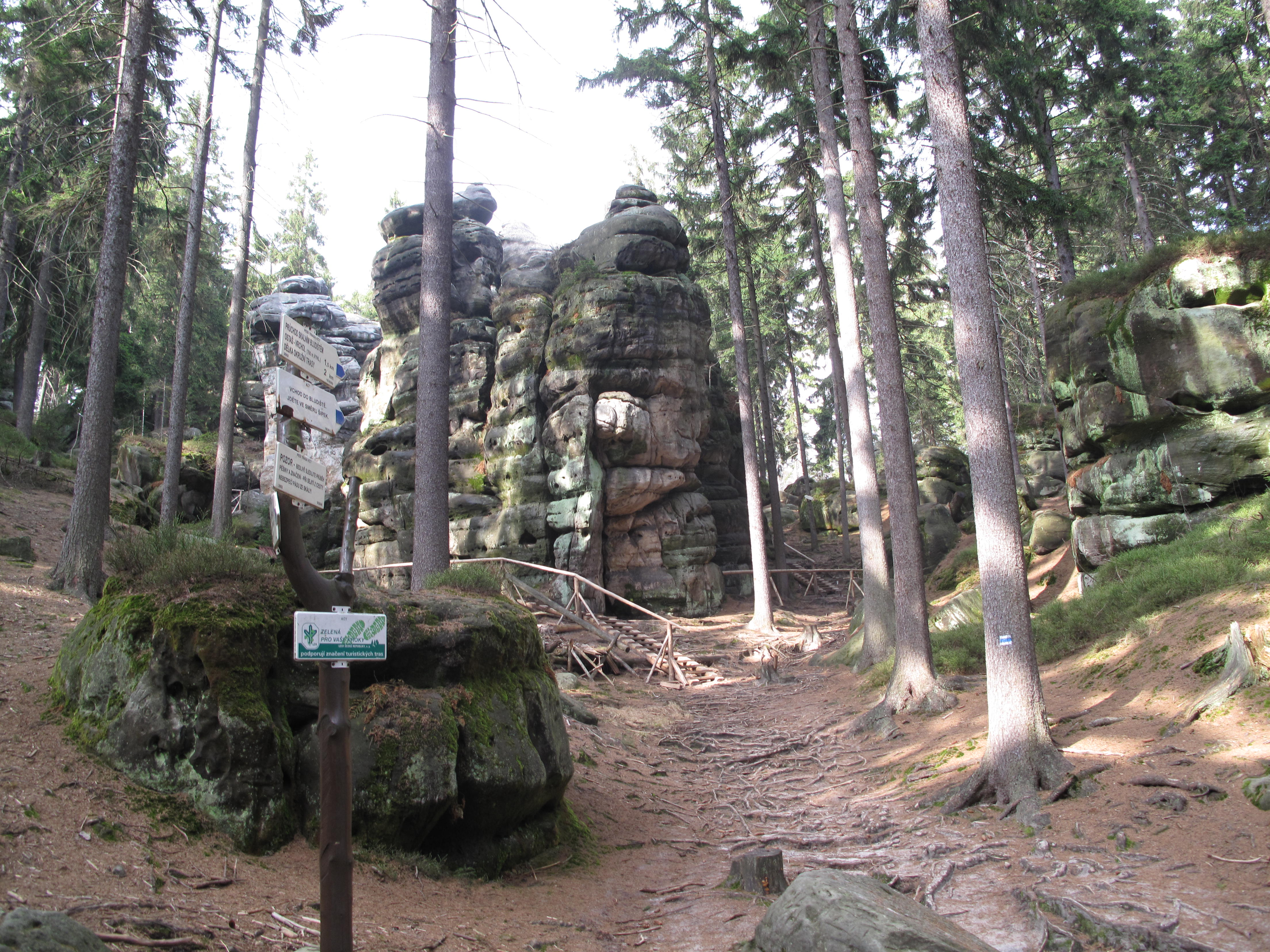 Ostaš